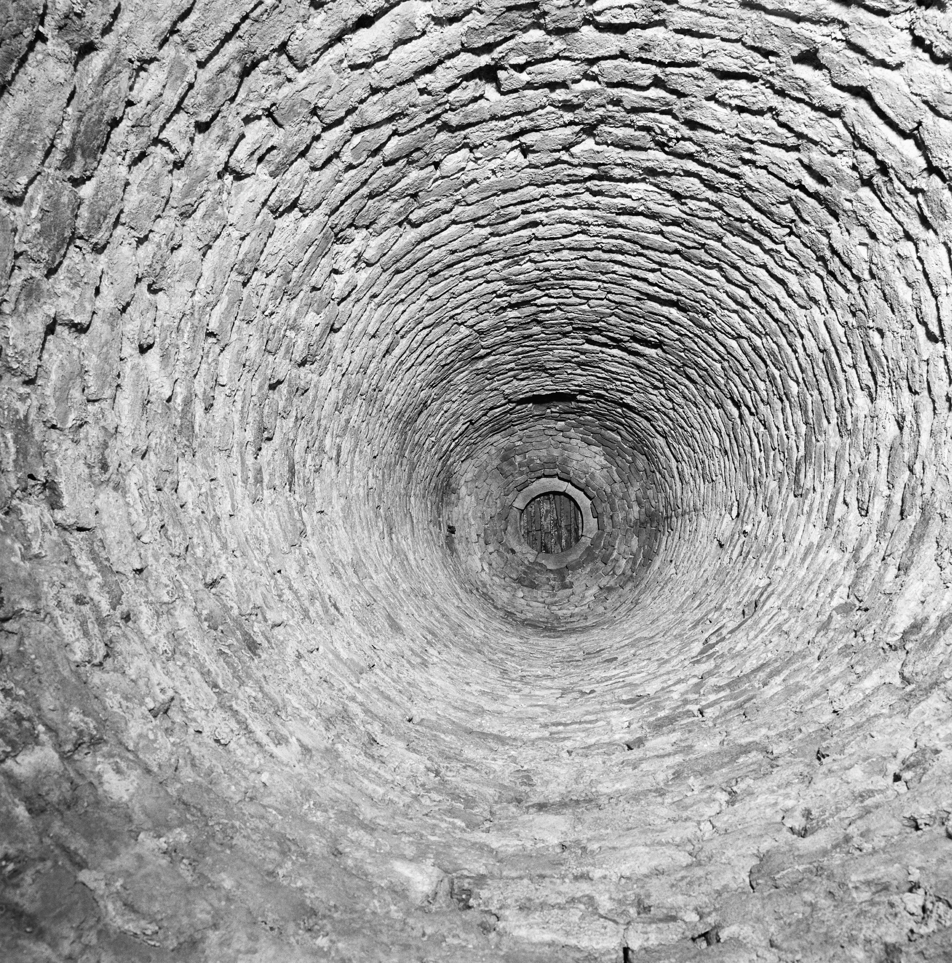 Sonnenborgh. Interieur, 16e eeuwse waterput naar boven gezien in aardlichaam